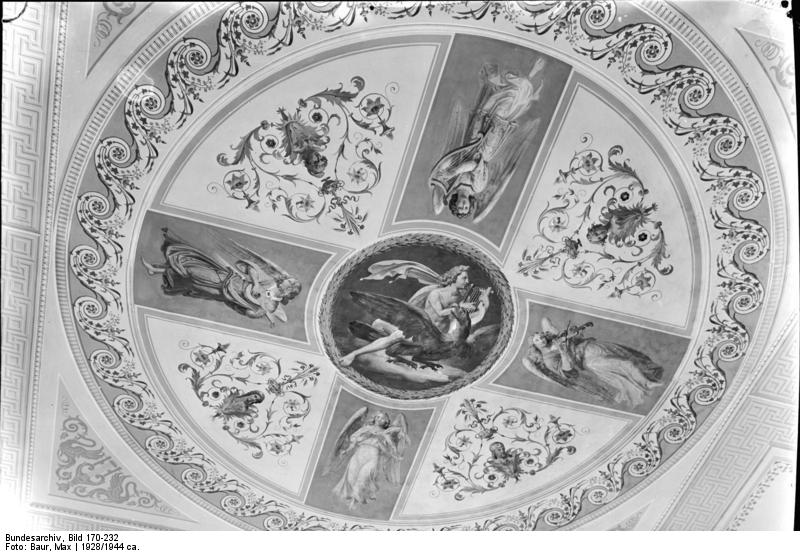 Potsdam.- Schinkelsaal im Schauspielhaus - Deckenbild